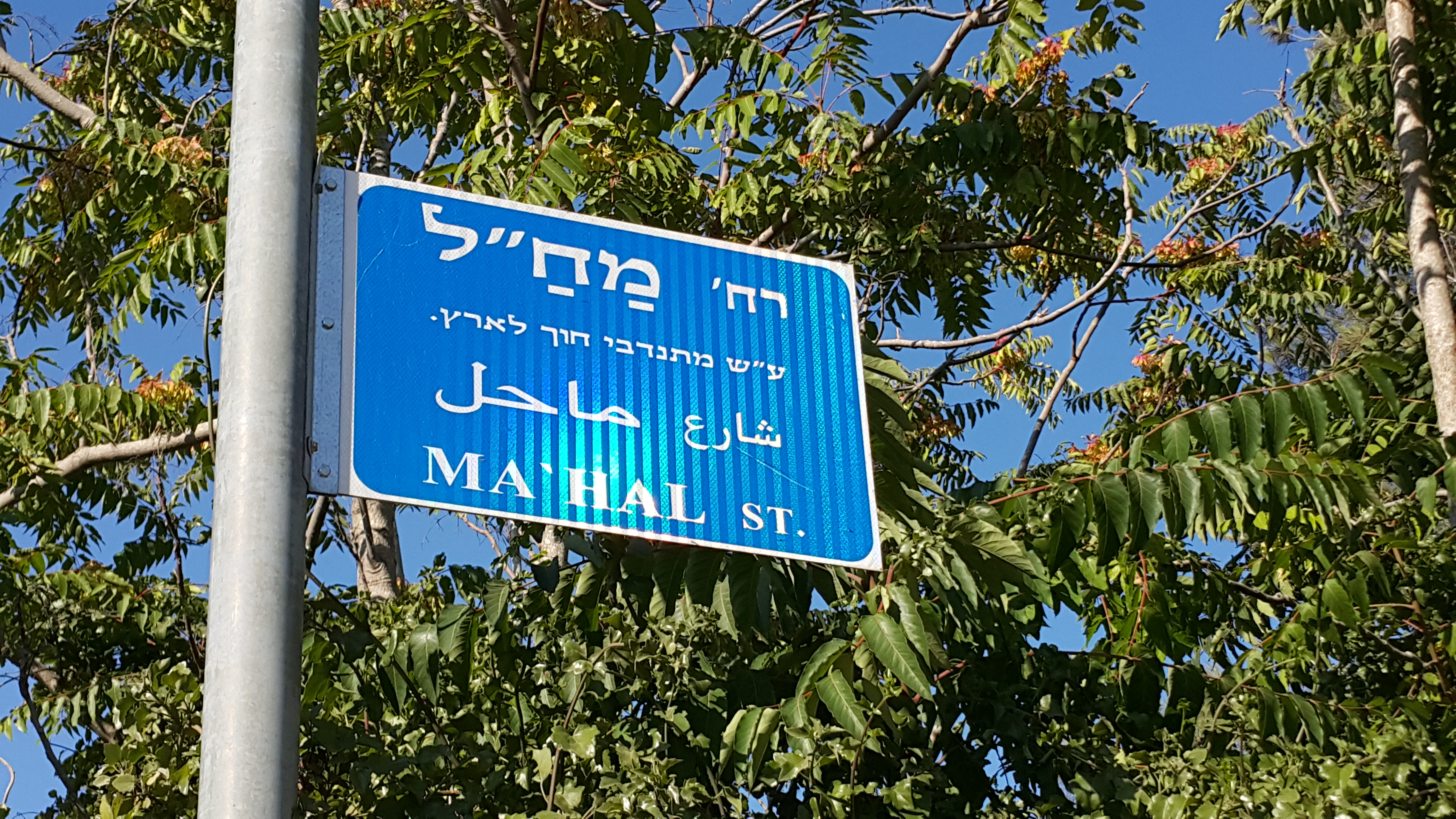 שלט רחוב בירושלים על שם מתנדבי חו"ל